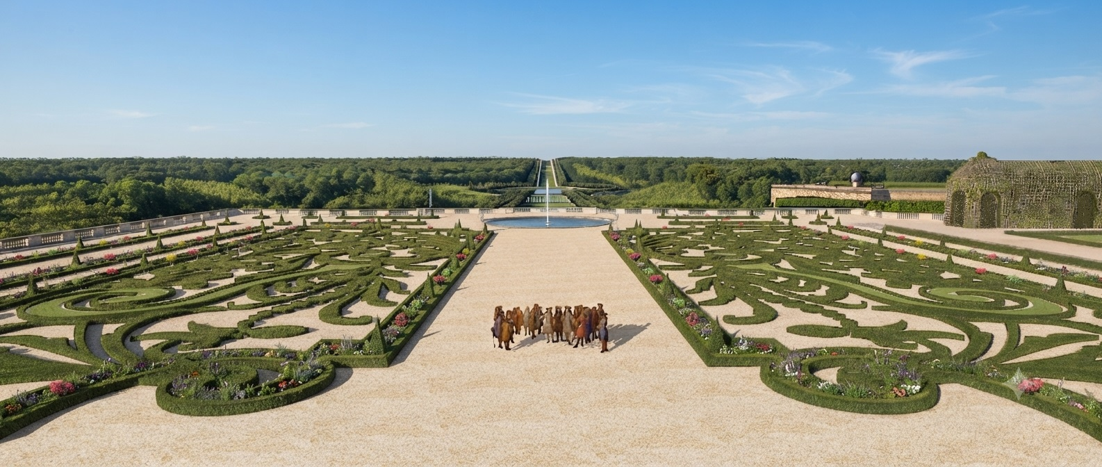 Restitution 3D de la vue depuis le balcon du premier étage du pavillon central du château-vieux de Meudon, vers 1690.